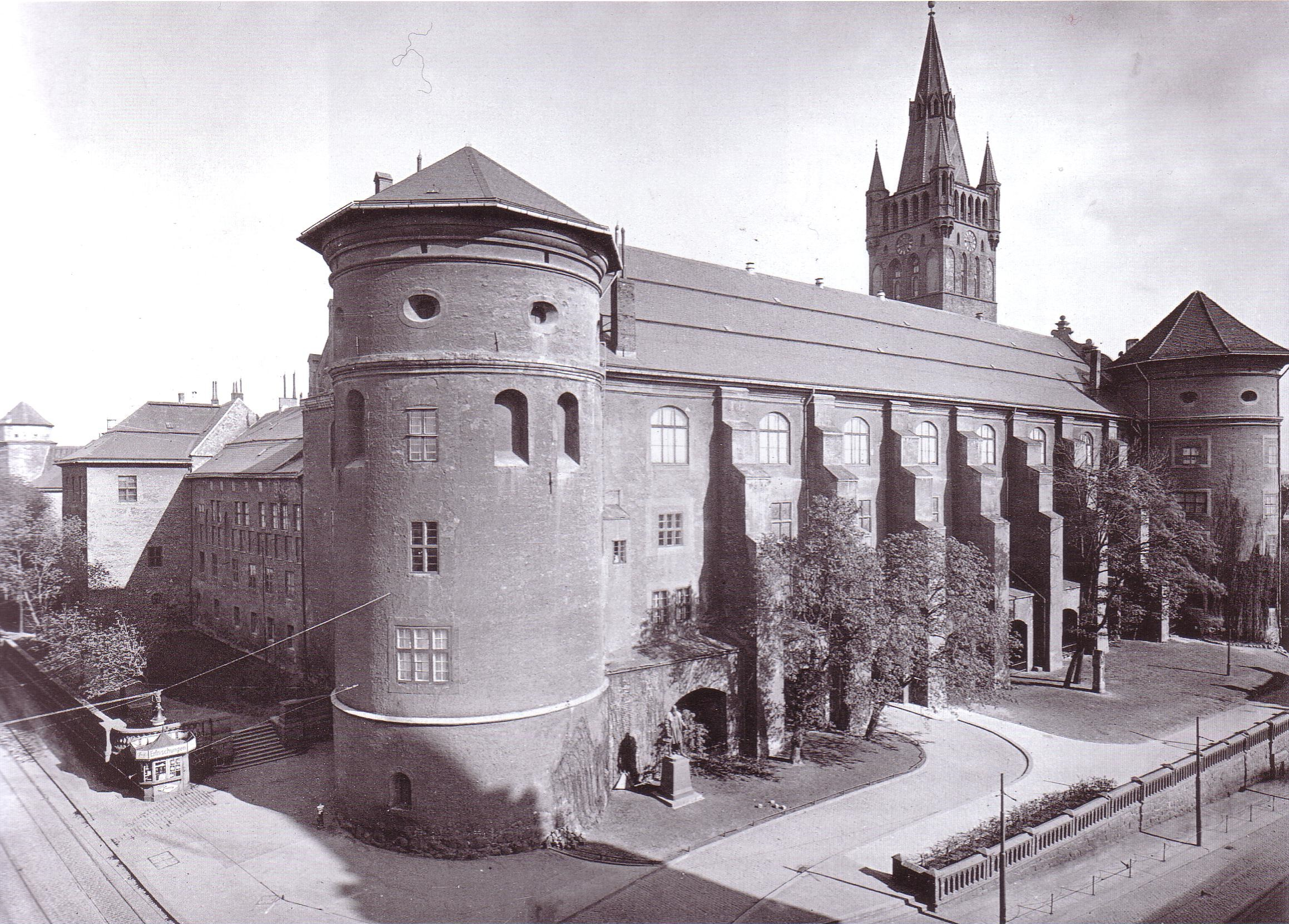 Blick von der Post auf den Westflügel mit dem nordwestlichen Rundturm (noch ohne das Herzog Albrecht-Denkmal) des Königsberger Schlosses. Links der Nordflügel mit dem Liedelauturm.